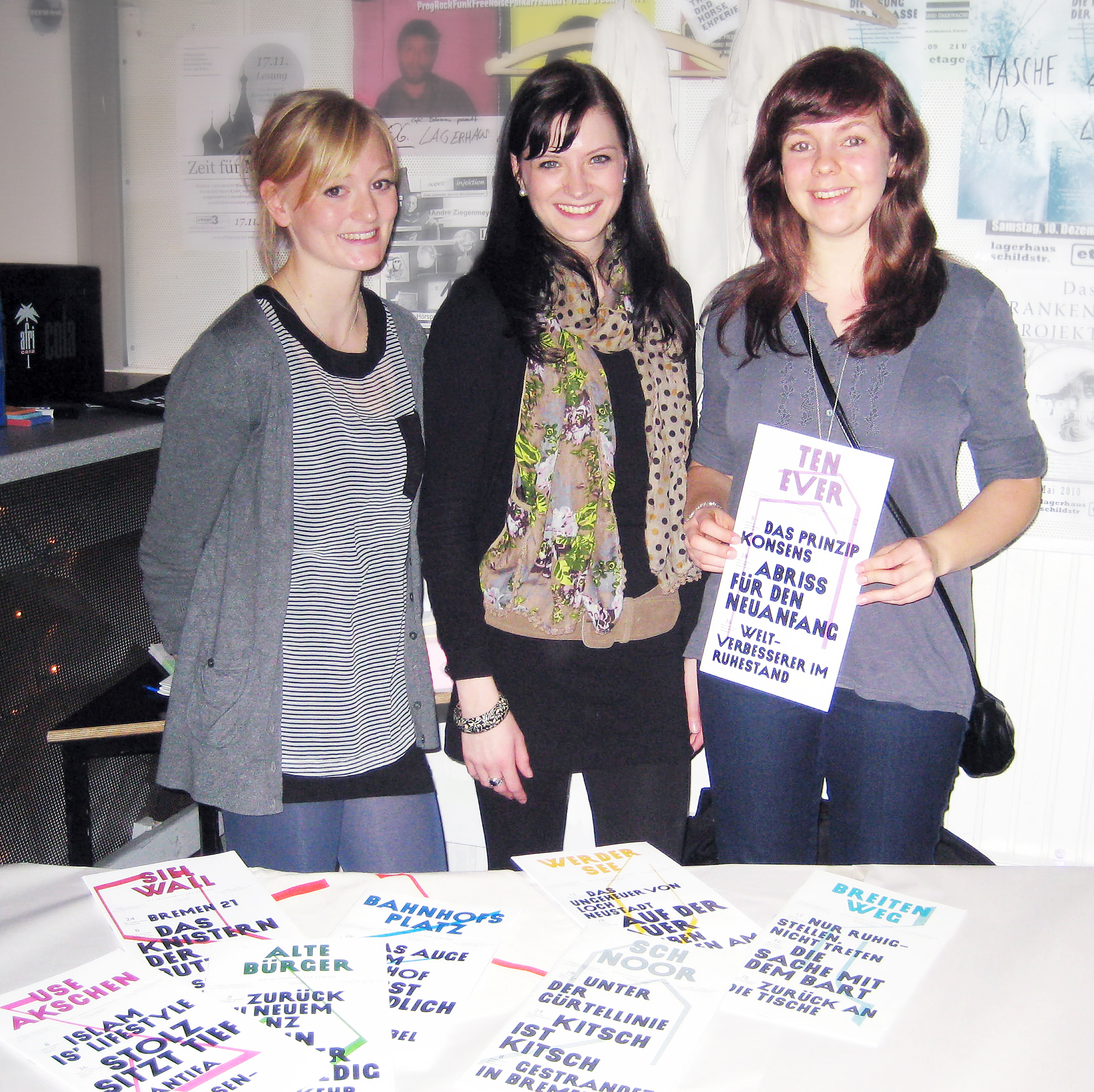 Studentische Mitarbeiterinnen des bremischen Straßenmagazins Zeitschrift der Straße, hier bei der Benefizveranstaltung „Lesung der Straße“ am 17. Februar 2012 im Kulturzentrum Lagerhaus in Bremen.